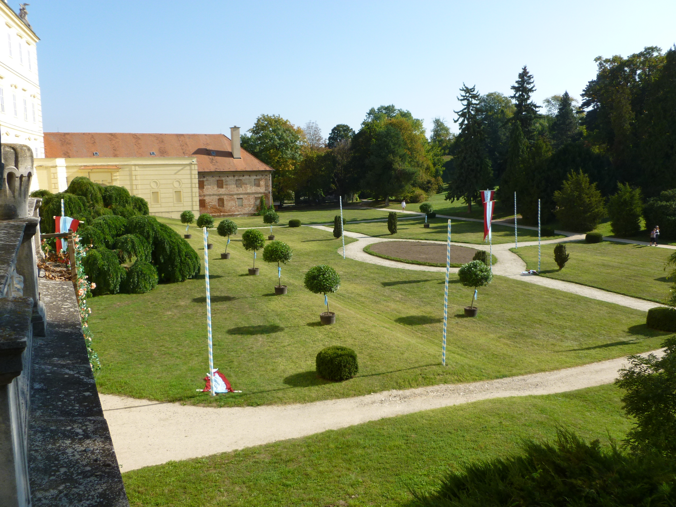 Zámek Valtice, Valtice 1